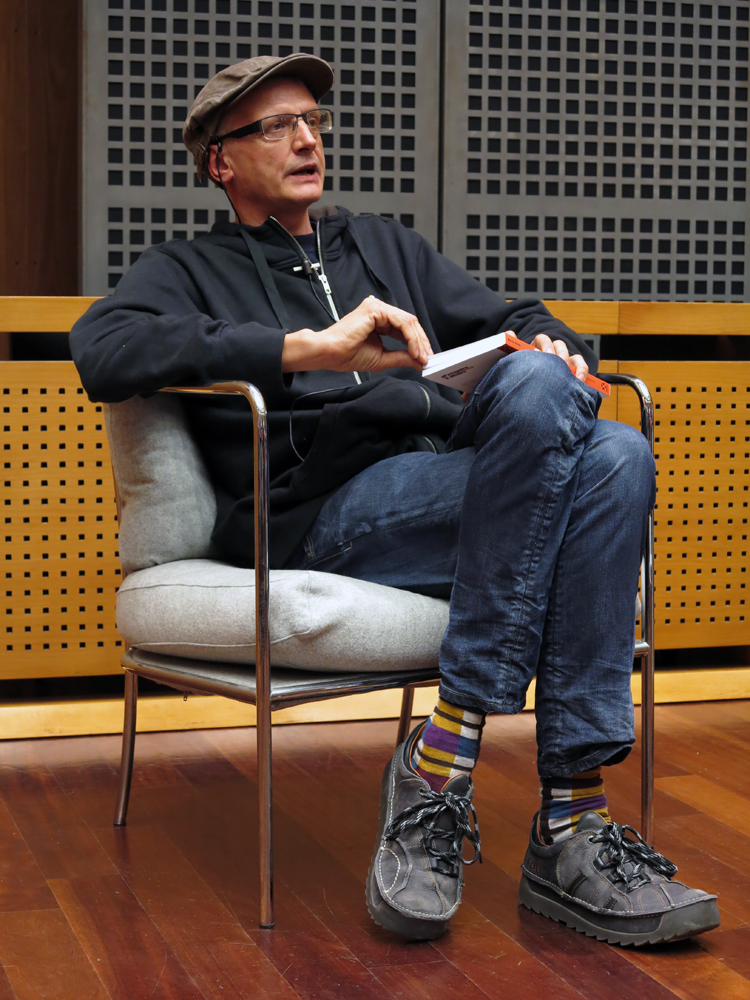 Marco Philopat